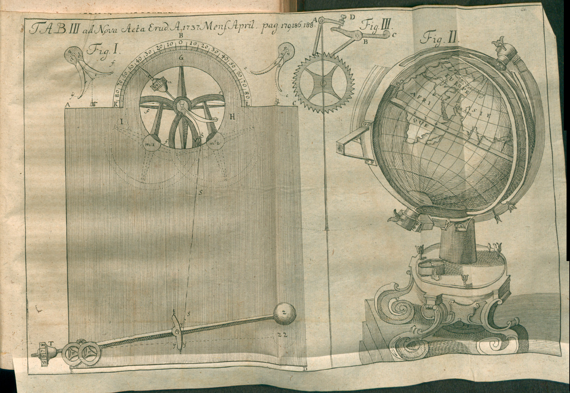 Illustration